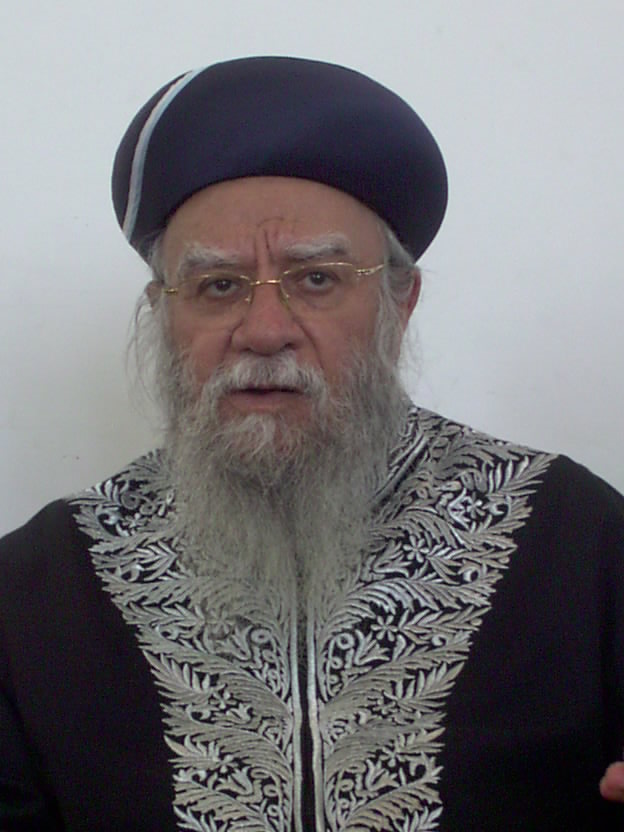 תמונה מיוחדת של הרב הראשי לישראל הרב אליהו בקשי דורון זצ"ל צולם בלשכתו בירושלים